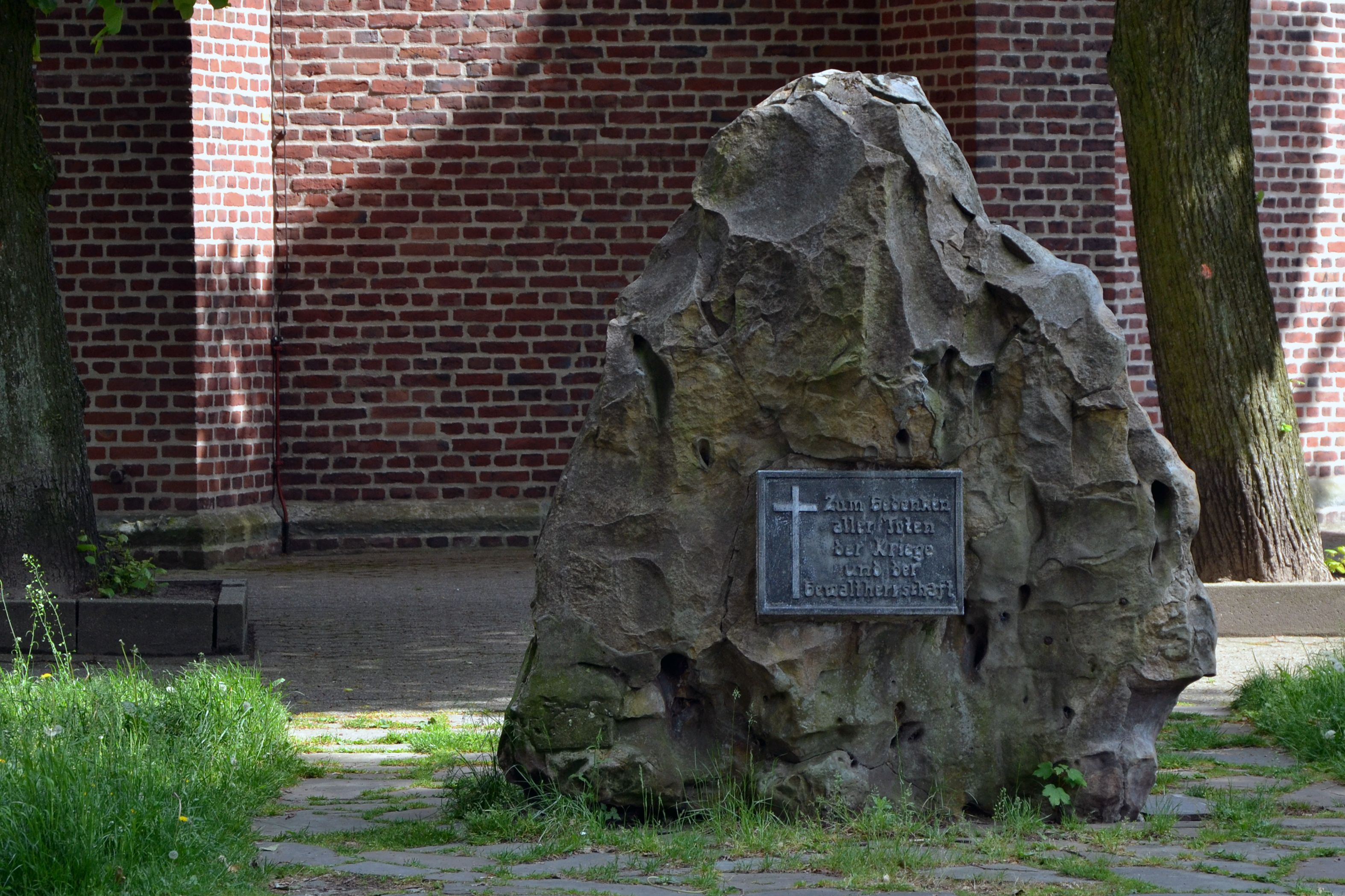 Essen-Frintrop, Gedenkstein an alle Toten von Krieg und Gewaltherrschaft an der St.-Josef-Kirche